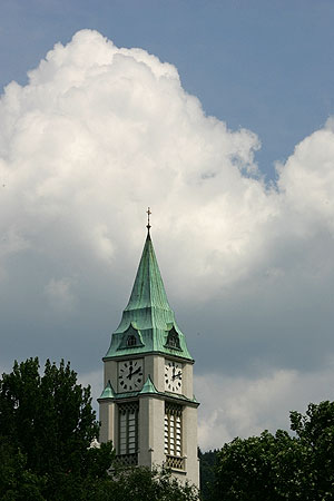 Biel / Bienne: kath. Kirche St.Marien